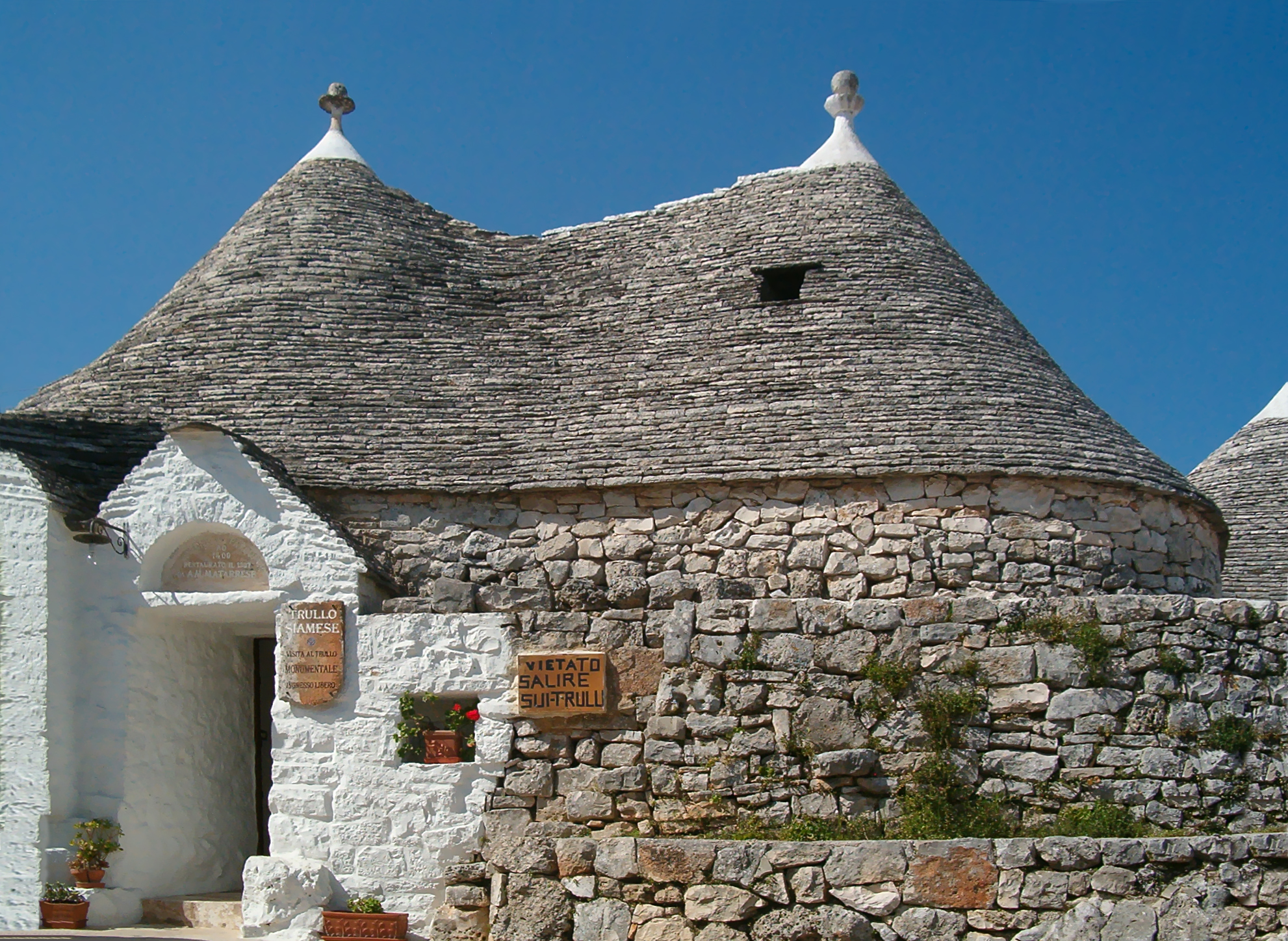 Trulli di Alberobello, Italy Il "Trullo siamese"